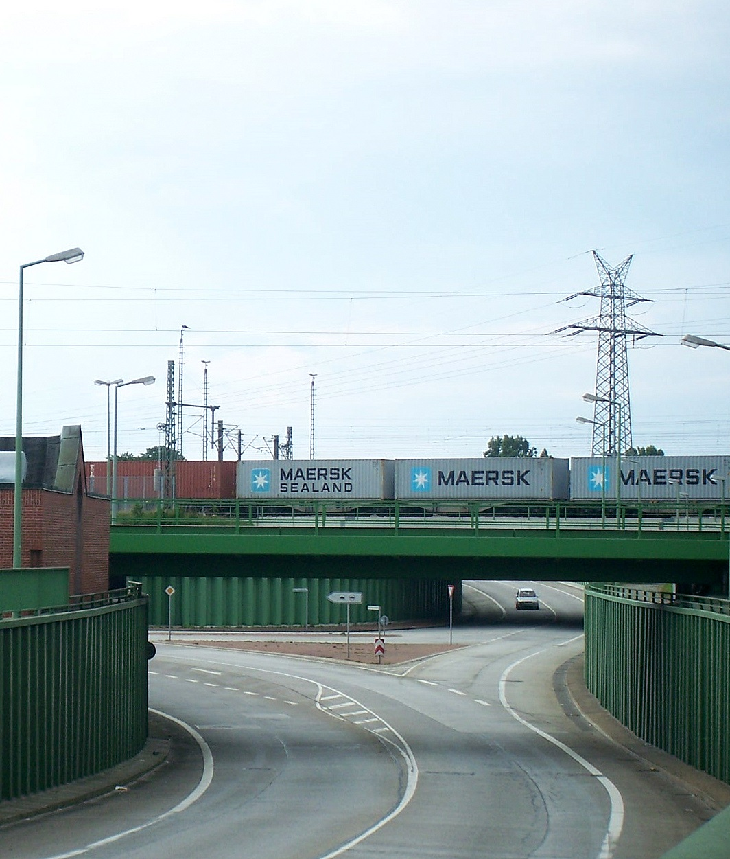 Sonntagsverkehr, Wurster Straße in Weddewarden, hinten 110-kV-Freileitungsmast